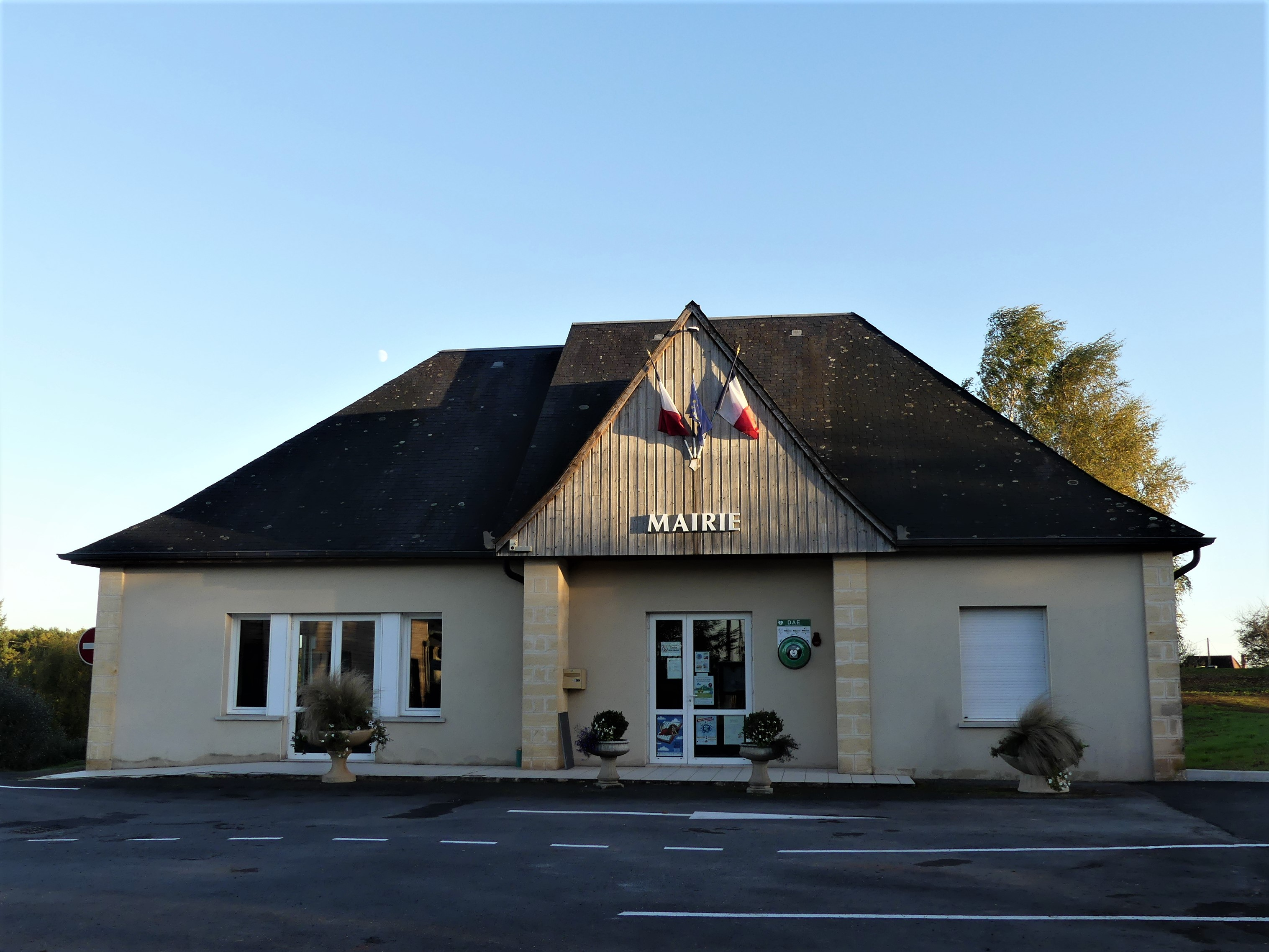 La mairie de Saint-Aulaire, Corrèze, France.